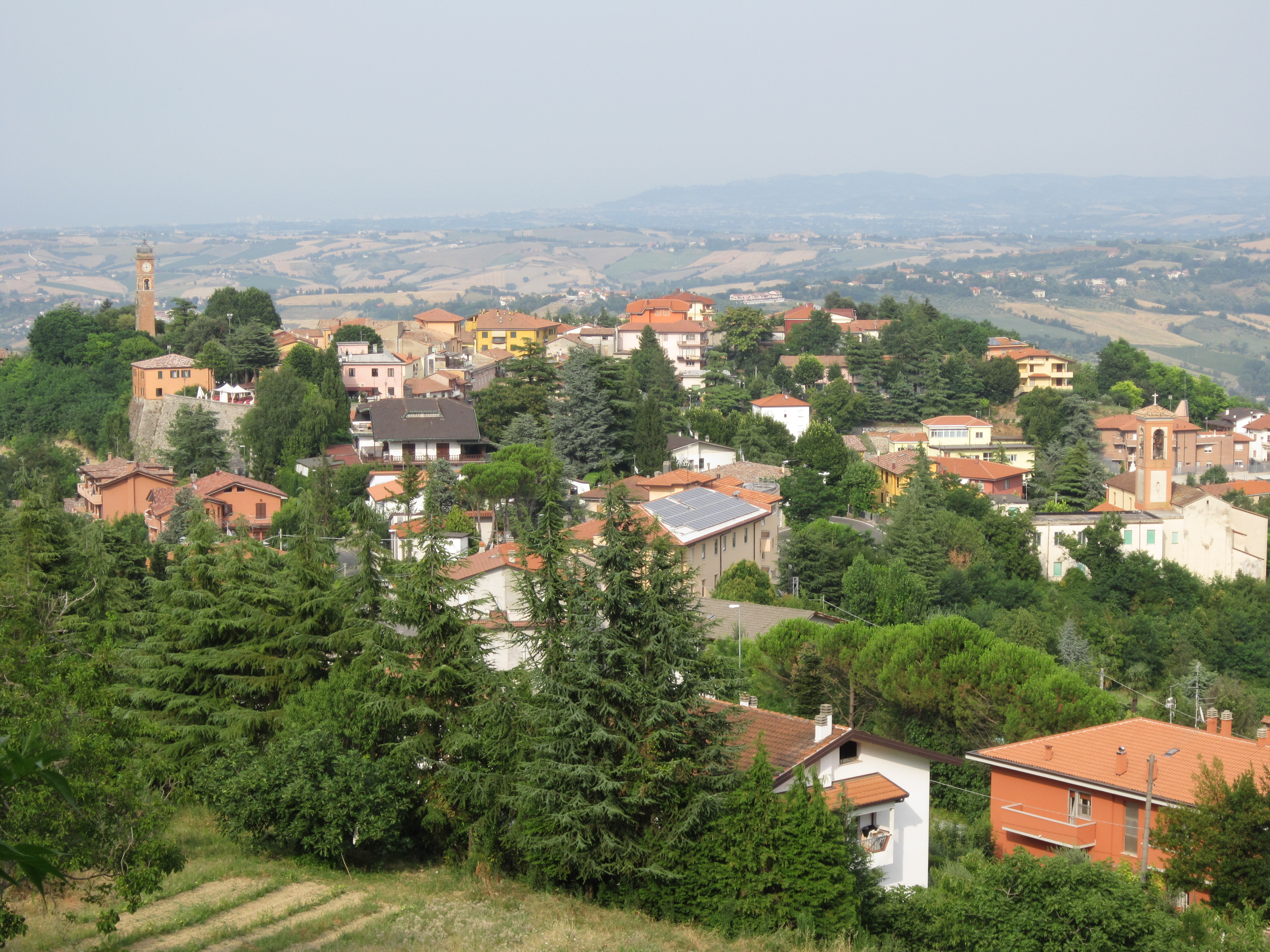 Panoramica su Montescudo (luglio 2015)